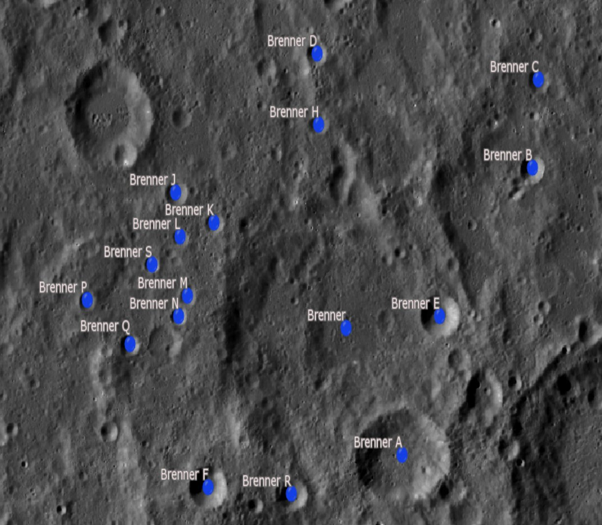 Cráter lunar Brenner. Cráteres satélite. (Imagen LRO)